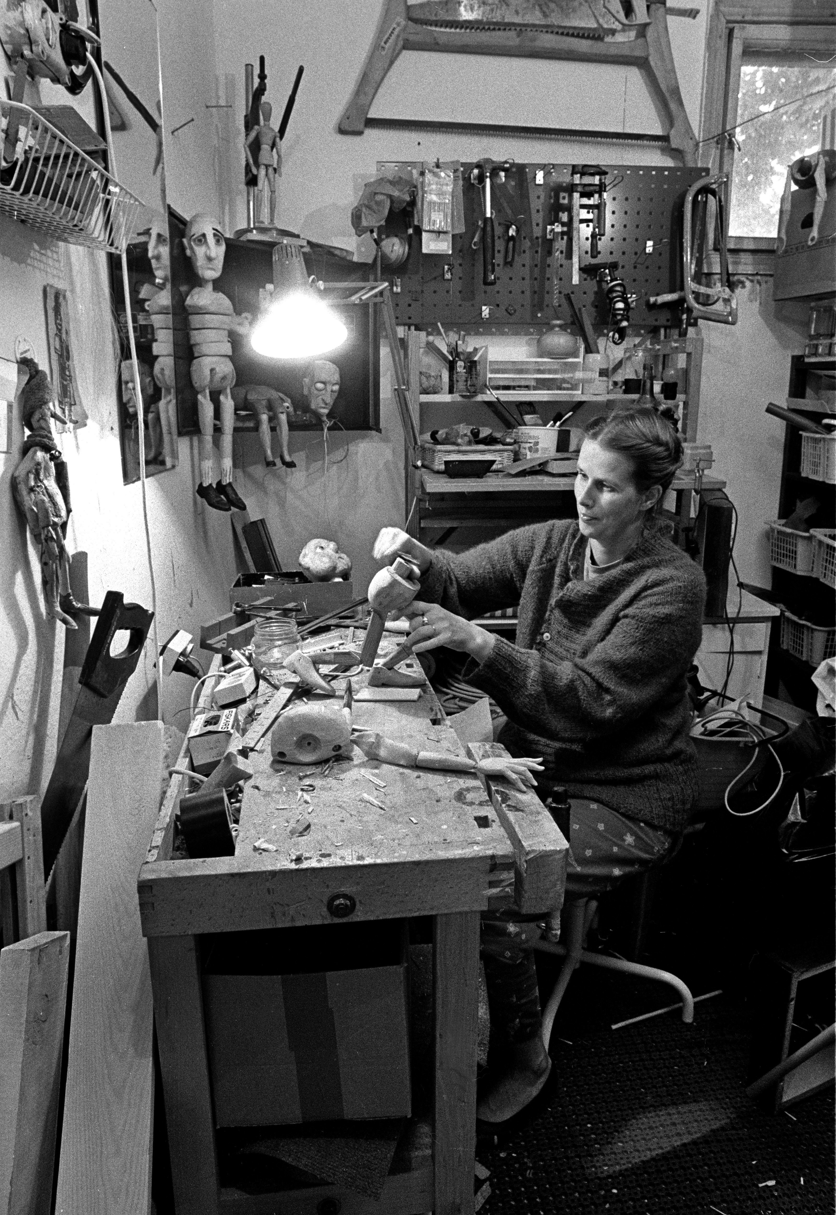 Maija Barić nukkepajalla